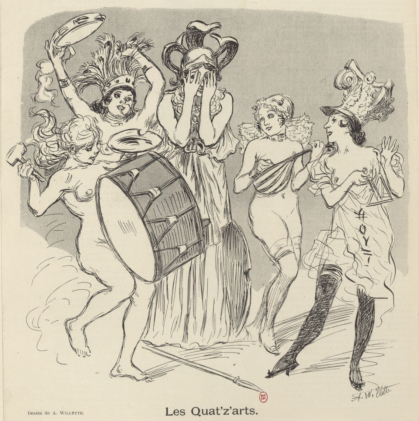 Les Quat'z'arts, lithographie de Willette.